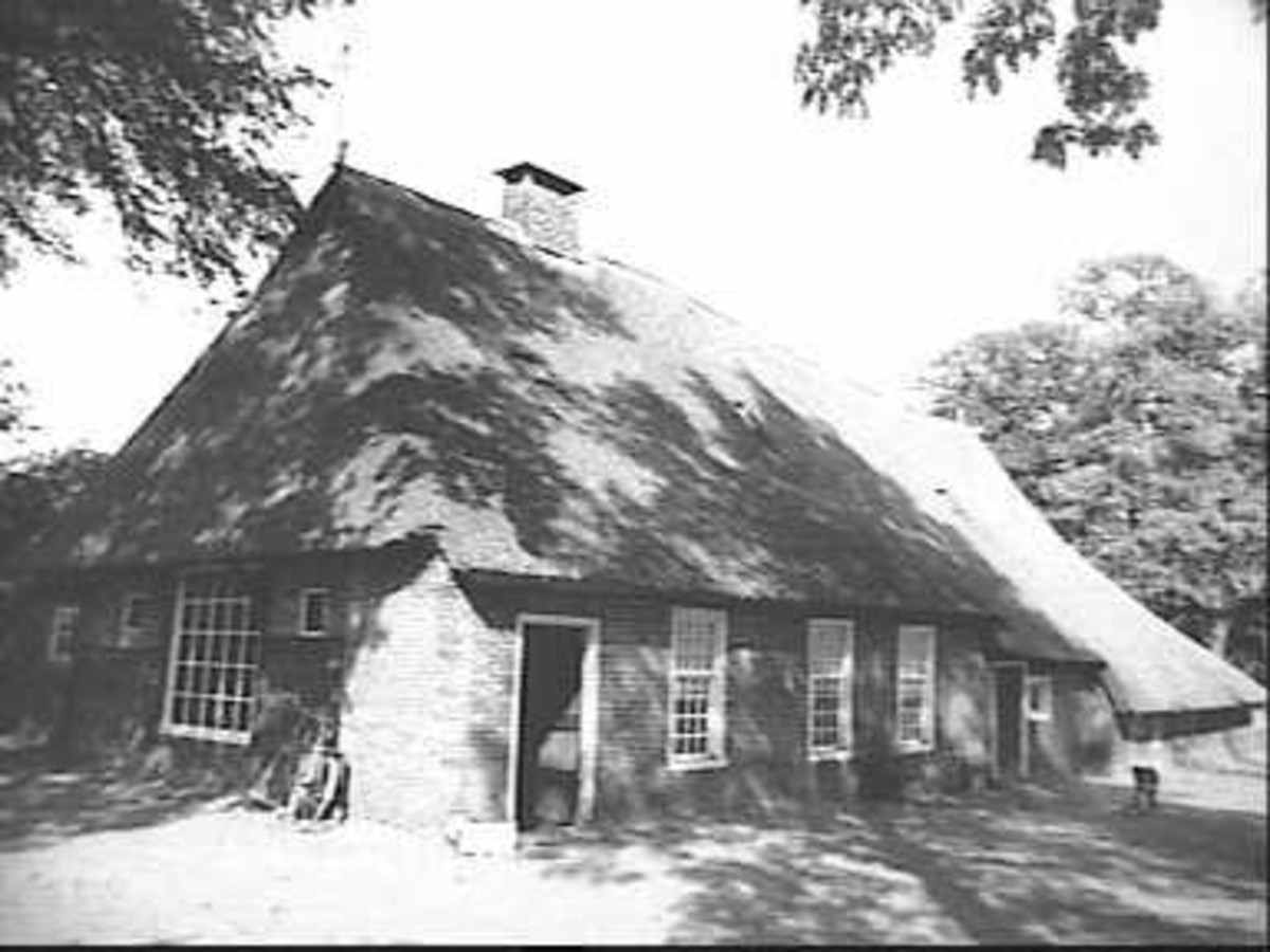 Naber's Hof: voor- en zijgevel nr. F 112-40 (opmerking: Deze afbeelding hebben wij helaas alleen in deze lage resolutie.)